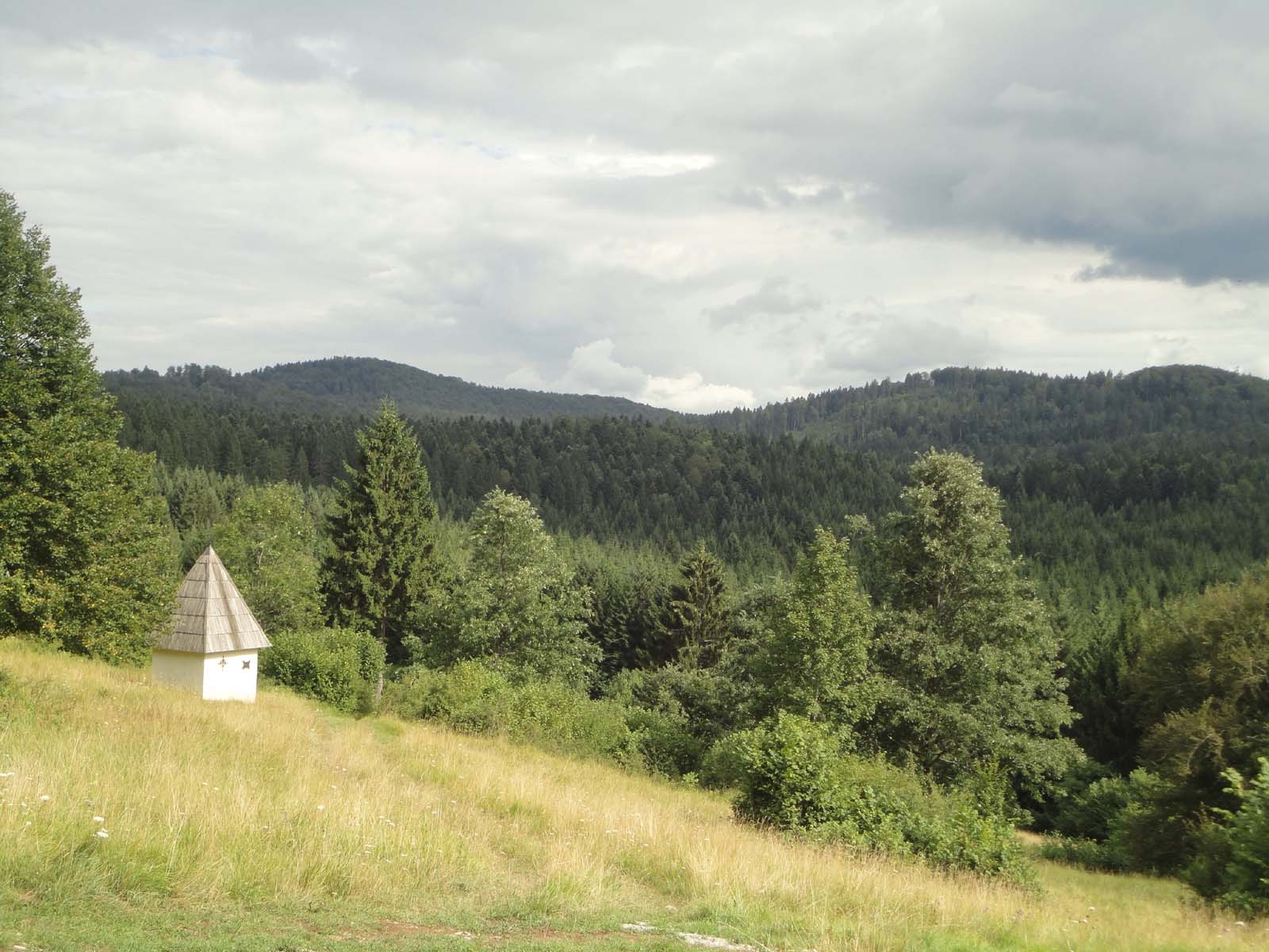 Kapelica in pokrajina v Podstenicah